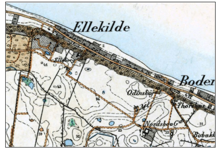 Ellekilde 1898